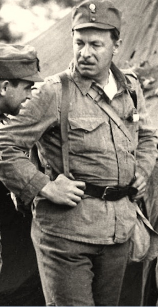 Suomalainen näyttelijä Tapio Hämäläinen (1922-2008) Antero Rokan roolissa kesällä 1964 Pyynikin Kesäteatterin esittämässä näytelmässä Tuntematon sotilas.